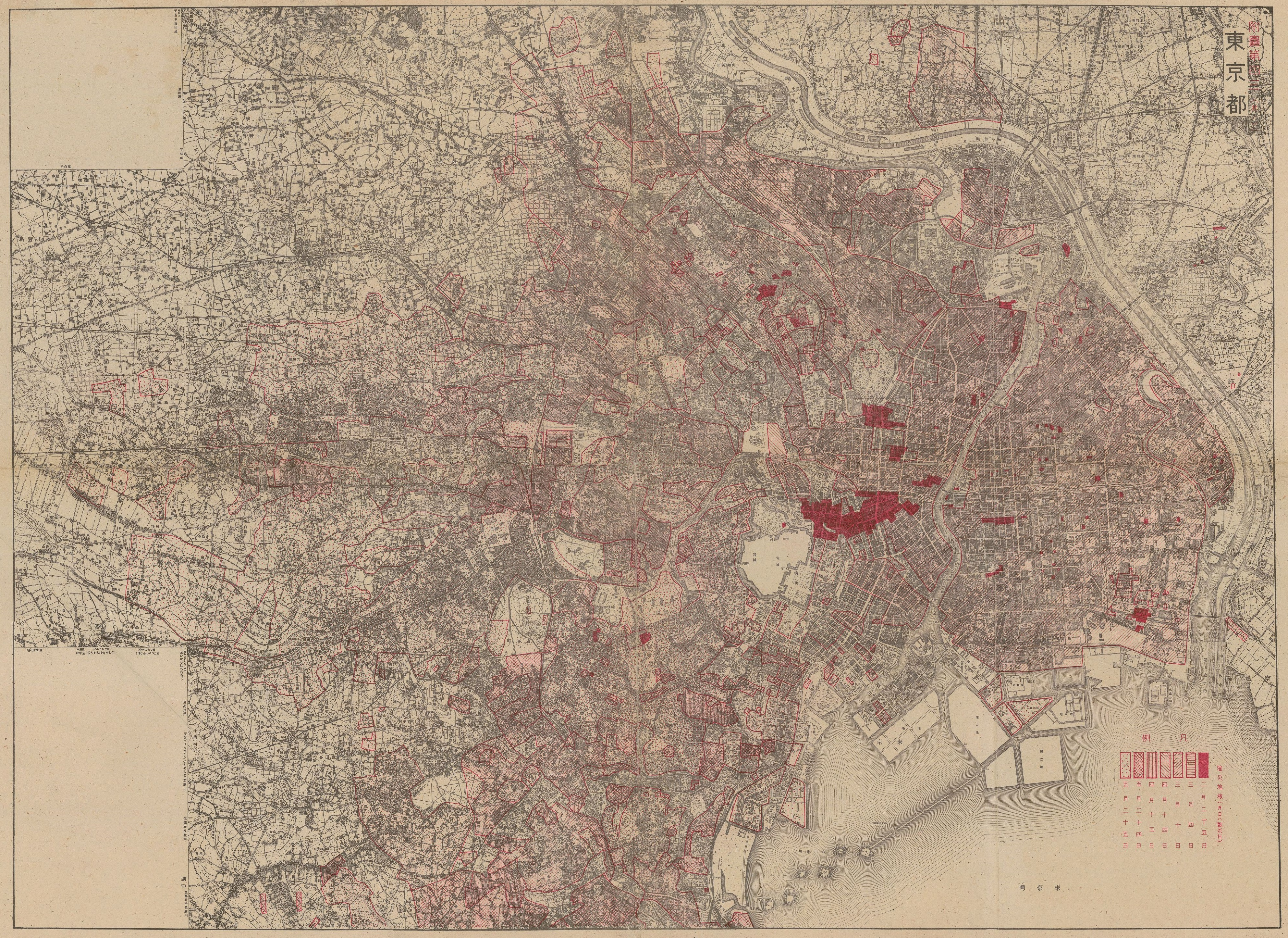 東京市（当時）の空襲被害状況をまとめた地図（1945年12月）。戦災の概況を復員帰還者に知らせるために作成された。